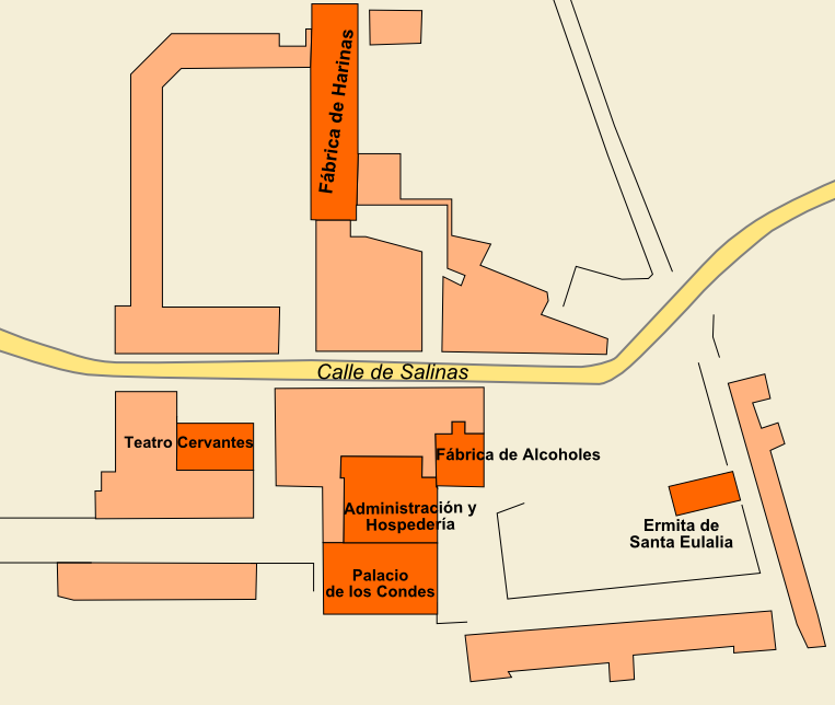 Planta de la Colonia de Santa Eulalia, entre els termes de Villena i Saix.